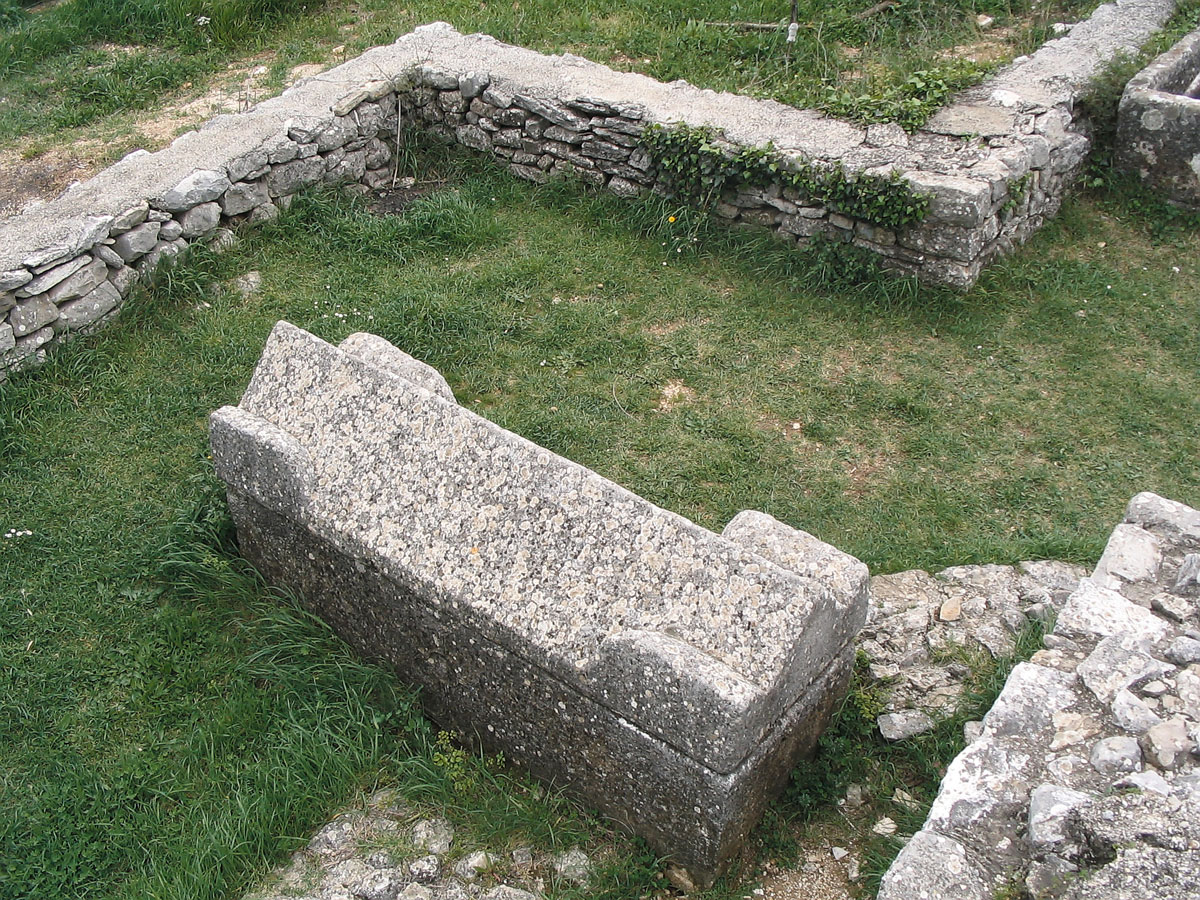 Sarkofag u Bijaćima, Kaštel Novi